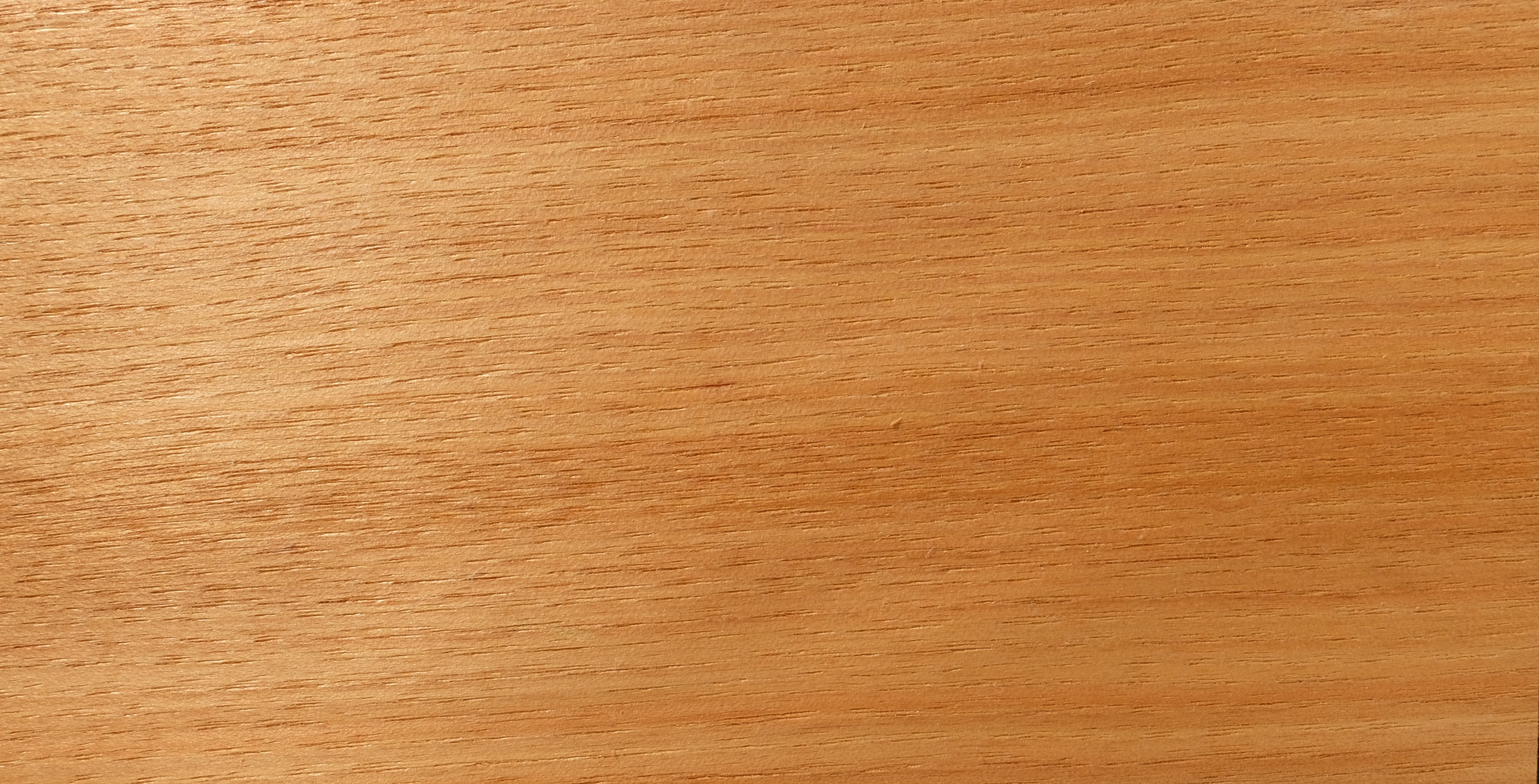 gemessertes Furnier; Holzart: HIC, Hickory, True Hickory